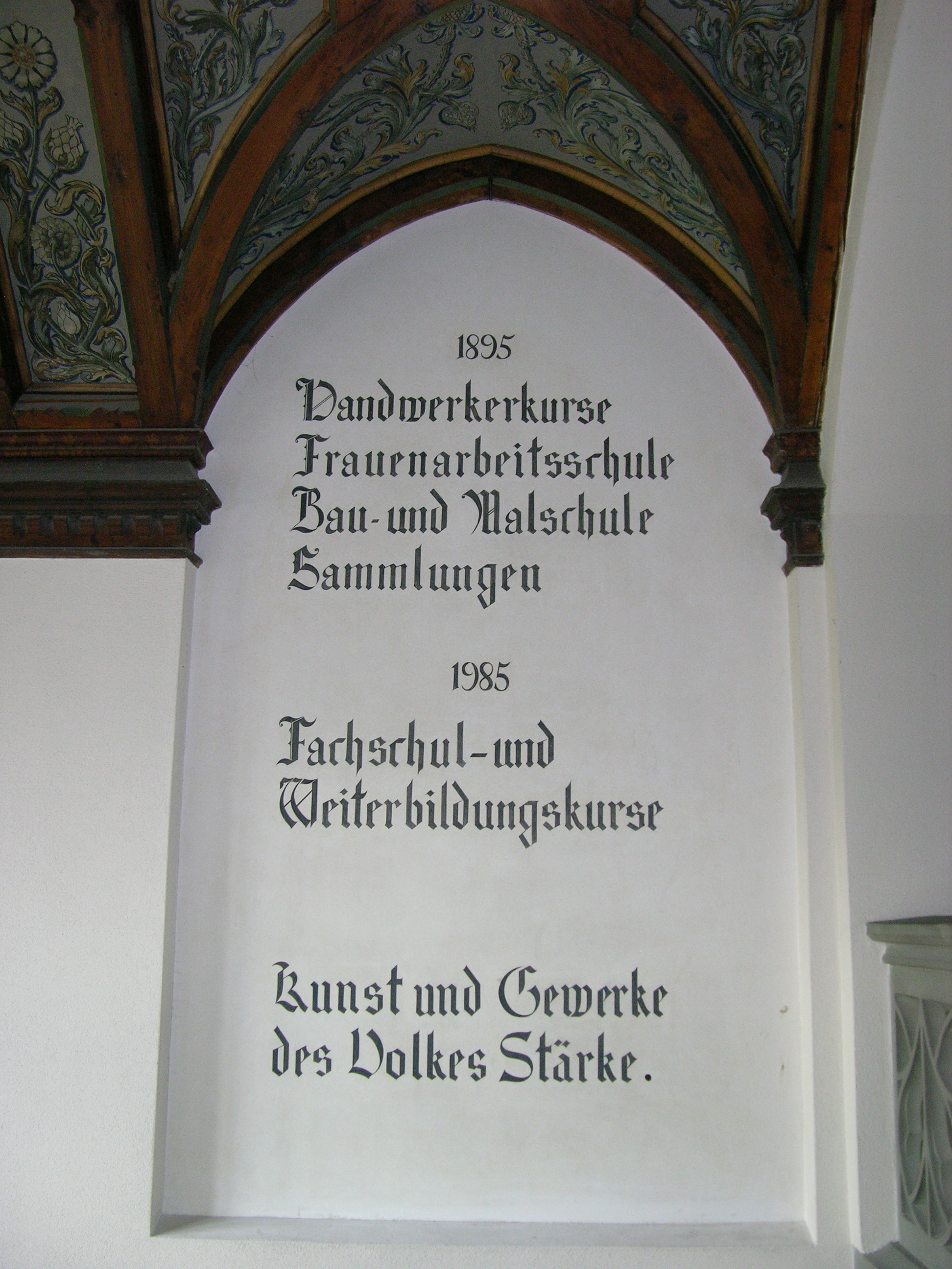 Schrift im dritter Stock des Karl-Moser-Hauses der Alten Kantonsschule Aarau